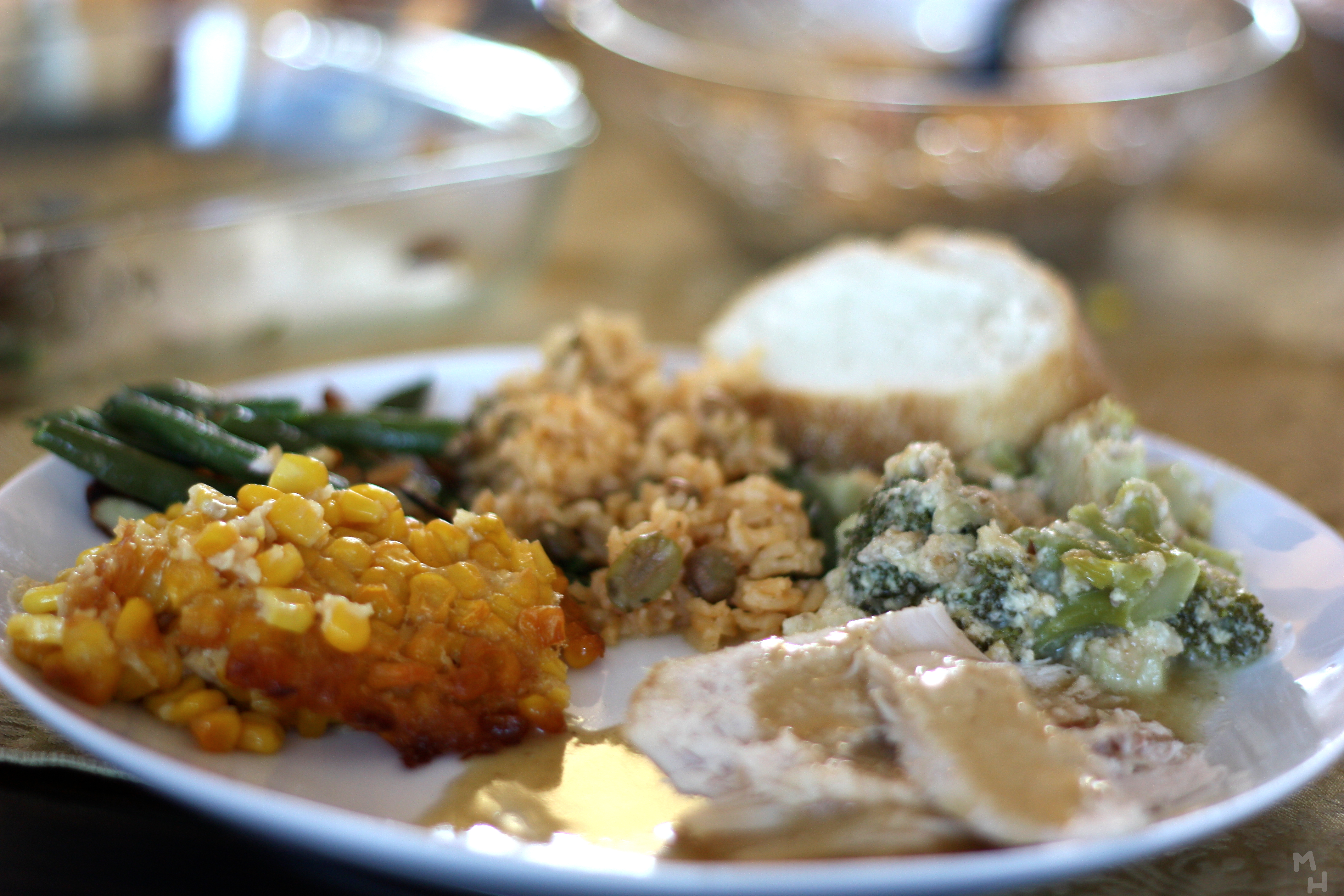 Thanksgiving Dinner